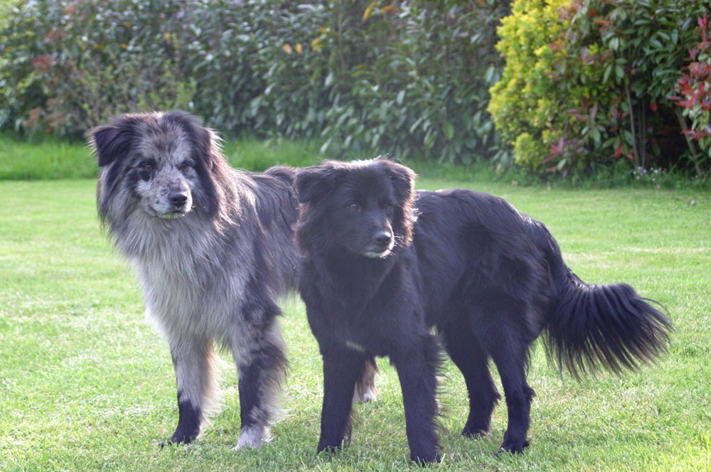 Berger des Pyrénées Face rase - U'Lys Bleu, champion de France - mâle + femelle